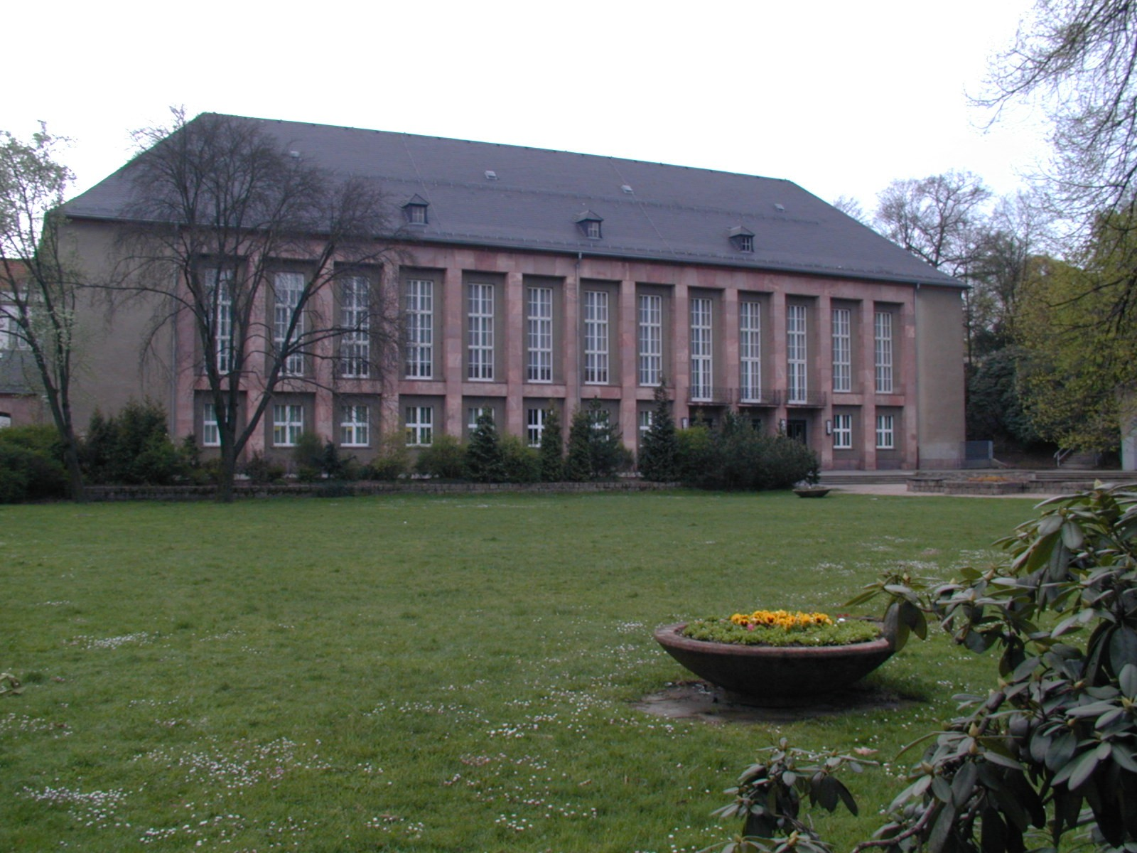 Kulturhaus in Aue